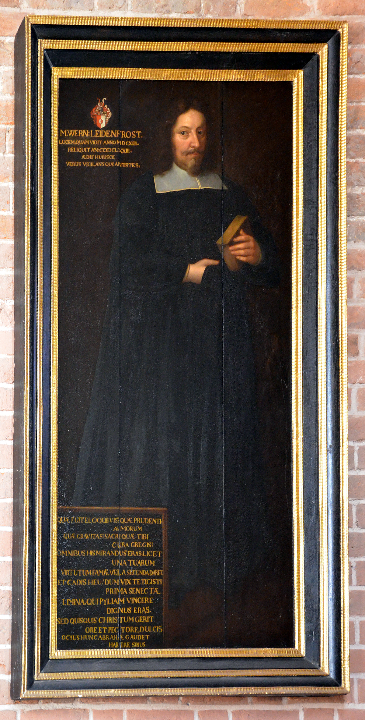 Ganzkörper-Porträt eines noch unidentifizierten Meisters aus dem 17. Jahrhundert mit dem Bildnis des evangelischen Theologen Werner Leidenfrost, ab 1651 Pfarrer an der Marktkirche St. Georgii et Jacobi zu Hannover. Die aus drei Brettern zusammengesetzte Eichentafel zeigt oben links unter dem Wappen der Familie die lateinische Inschrift: „M. WERN: LEIDENFROST. / LUCEM,QUAM VIDIT ANNO MDCXIIII. / RELIQUIT AN: CDDCLXXIII. / ÆDIS HUIUSCE / VERUS VIGILANS QUE ANTISTES.“ Unten links findet sich die Aufschrift: „QUÆ FUITEL OQUIIVIS QUÆ PRUDENTI / A MORUM / QUÆ GRAVITAS SACRIQUÆ TIBI / CURA GREGIS! / OMNIBUS HISMIRANDUS ERAS; LICET / UNA TUARUM / VIRTUTUMFAMÆ VELA SECUNDA DARET / ET CADIS HEU! DUM VIX TETIGISTI / PRIMA SENECTÆ / LIMINA. QUIPYLIAM VINCERE / DIGNUS ERAS. / SED QUISQUIS CHRISTUM GERIT / ORE ET PECTORE, DULCIS / OCYUS HUNC ABRAHÆ GAUDET / HABERE SINUS.“ Das Gemälde mit dem original zum Tafelbild gehörigen Bilderrahmen ist Eigentum der Evangelisch-lutherischen Landeskirche Hannovers und findet sich nach einer aufwendigen Restaurierung im Jahr 2008 an einer Seitenwand über der Orgel-/Chor-Empore der Marktkirche zu Hannover. Das hier gezeigte Foto wurde aufgrund von Lichtreflektionen ursprünglich von der Seite aufgenommen, mit dem freien und kostenlos herunterladbaren Fotobearbeitungsprogramm GIMP "entzerrt", anschließend mit dem Bildbearbeitungsprogramm Adobe Photoshop Elements der Kontrast verbessert. Zukünftig sollte von Anfang an ein besser ausgeleuchtetes Foto in höherer Auflösung aufgenommen werden. Eine schriftliche Dokumentation mit Details insbesondere zu den einzelnen Restaurierungs-Verfahren des Gemäldes (sowie mit leicht abweichender Abschrift der lateinischen Texte) hält die Kirchenpädagogin der Marktkirche, Marion Wrede vor ...